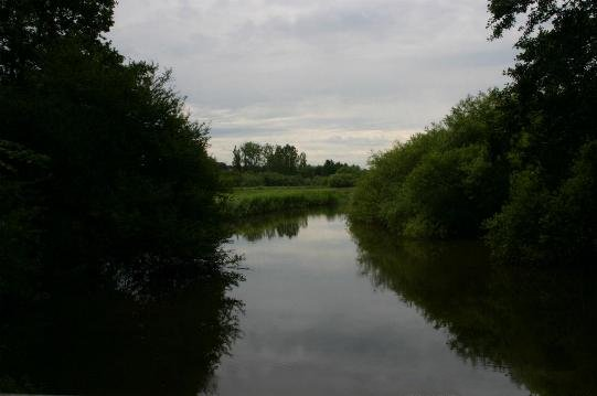 Århus Å